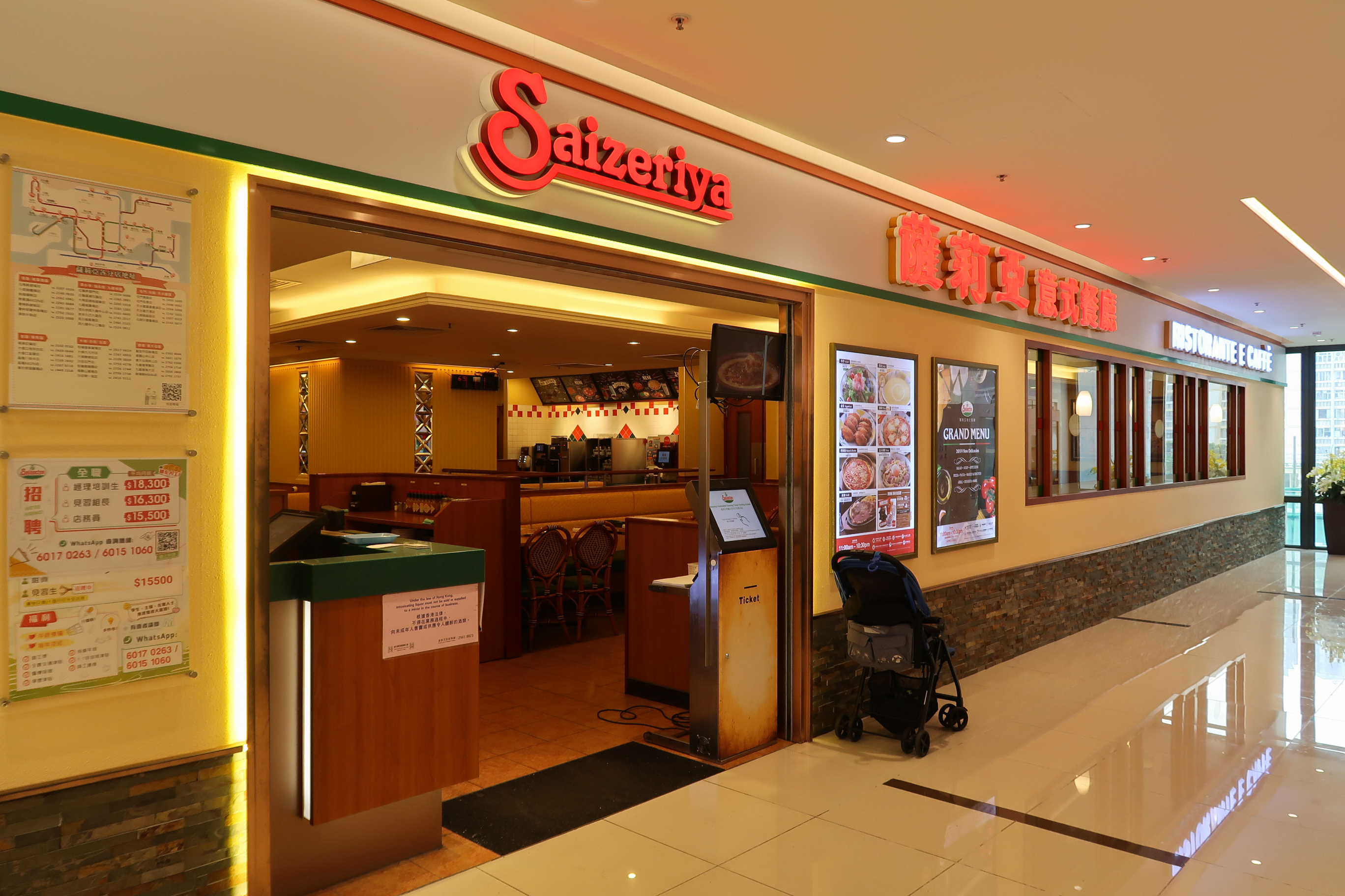 Saizeriya in 8 and one half